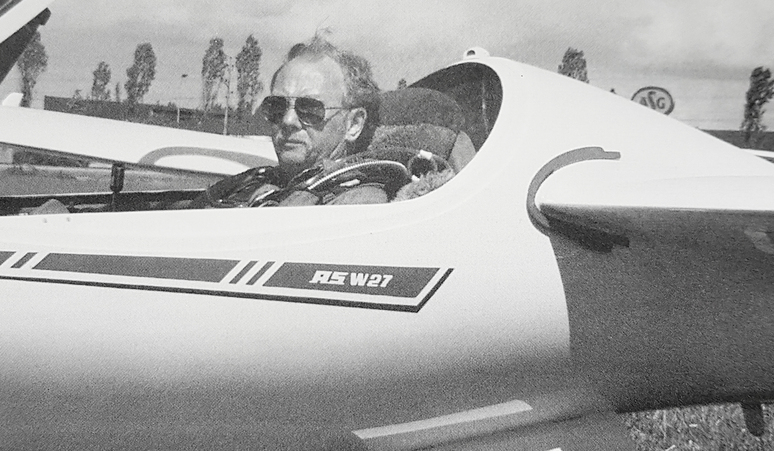 Göran Ax i en ASW 27